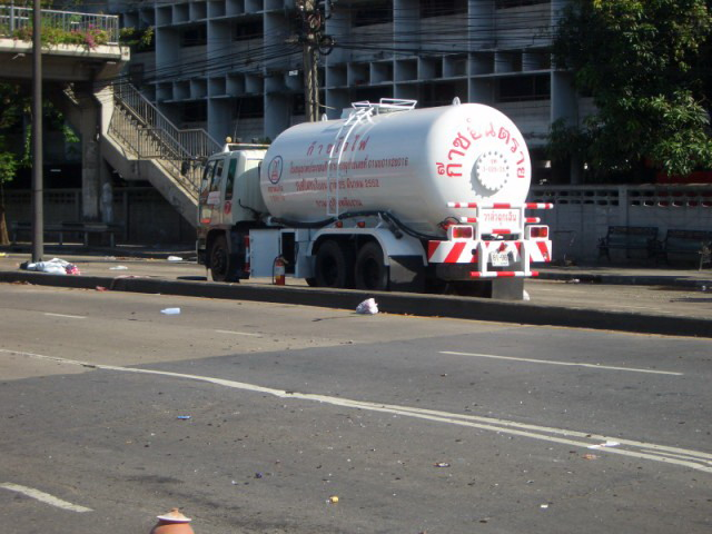 The liquid gas truck that the red shirt protesters threathened to blow up in the midst of the Din Daeng flats, Bangkok. Just minutes after this picture was taken the army moved in.